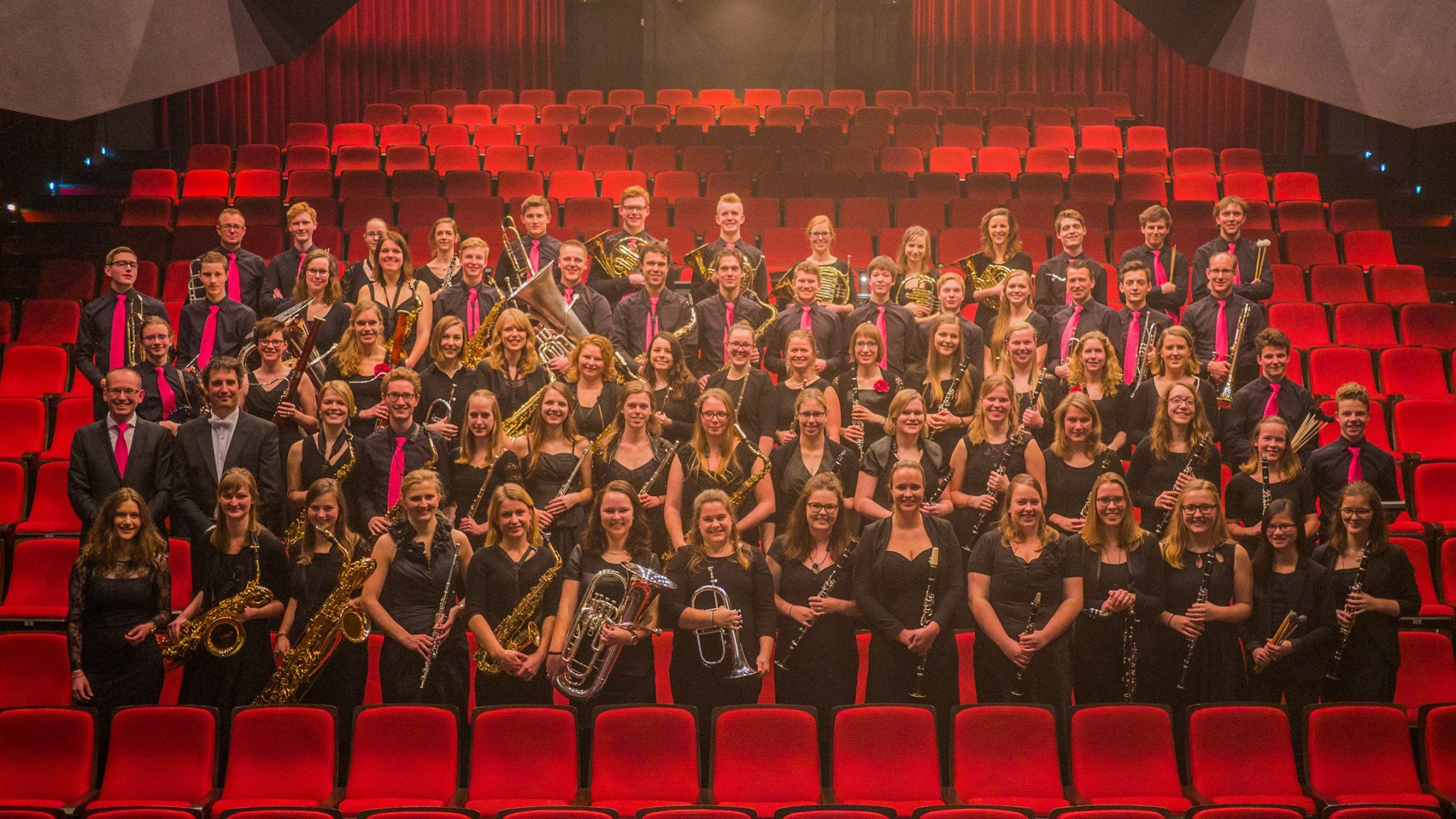 Het Noord Nederland Jeugd Orkest tijdens het nieuwjaarsconcert in de Voorveghter te Hardenberg